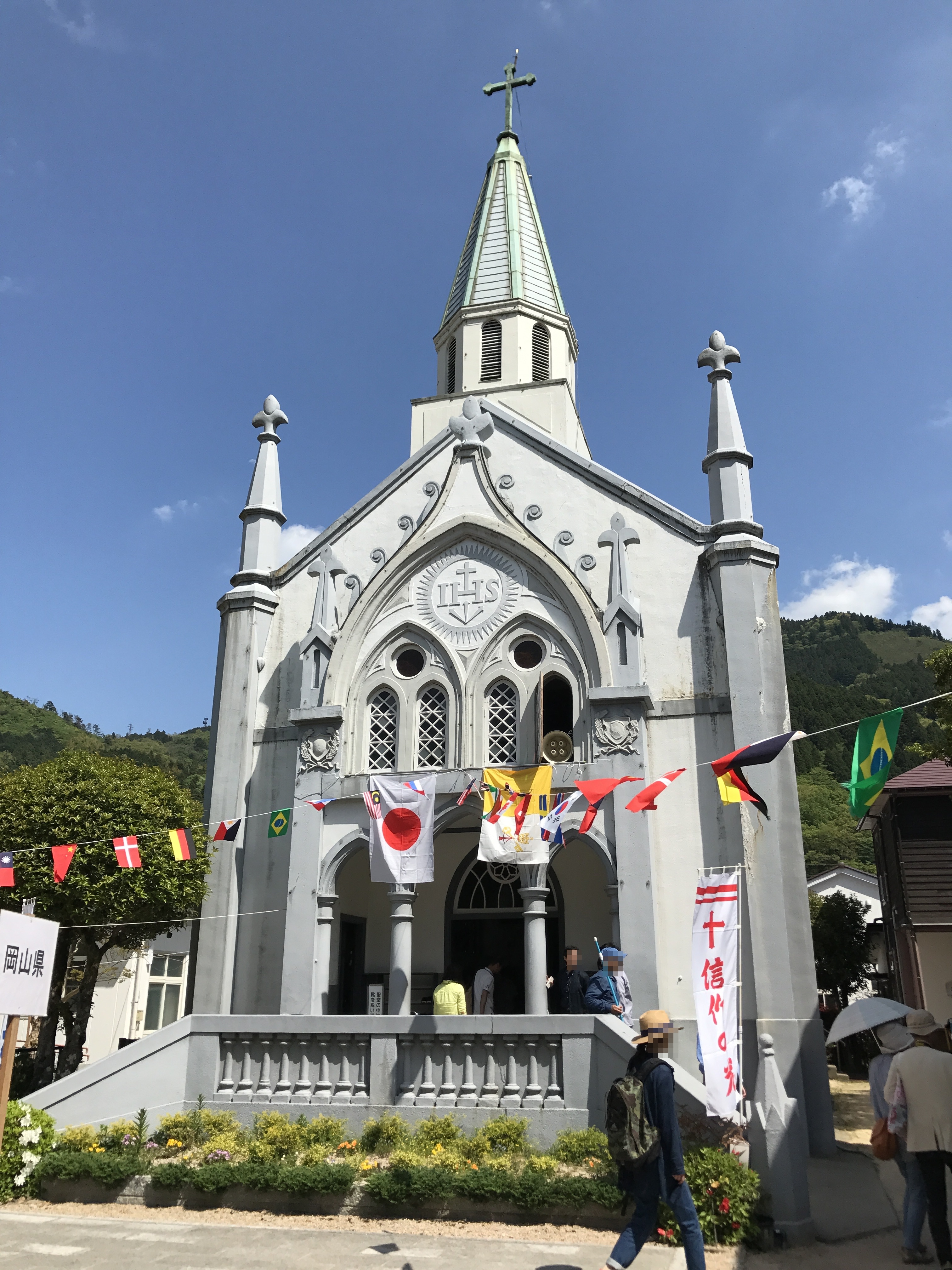 カトリック津和野教会